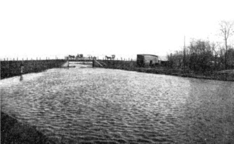 Canal del Norte en 1914. Junín, Argentina.